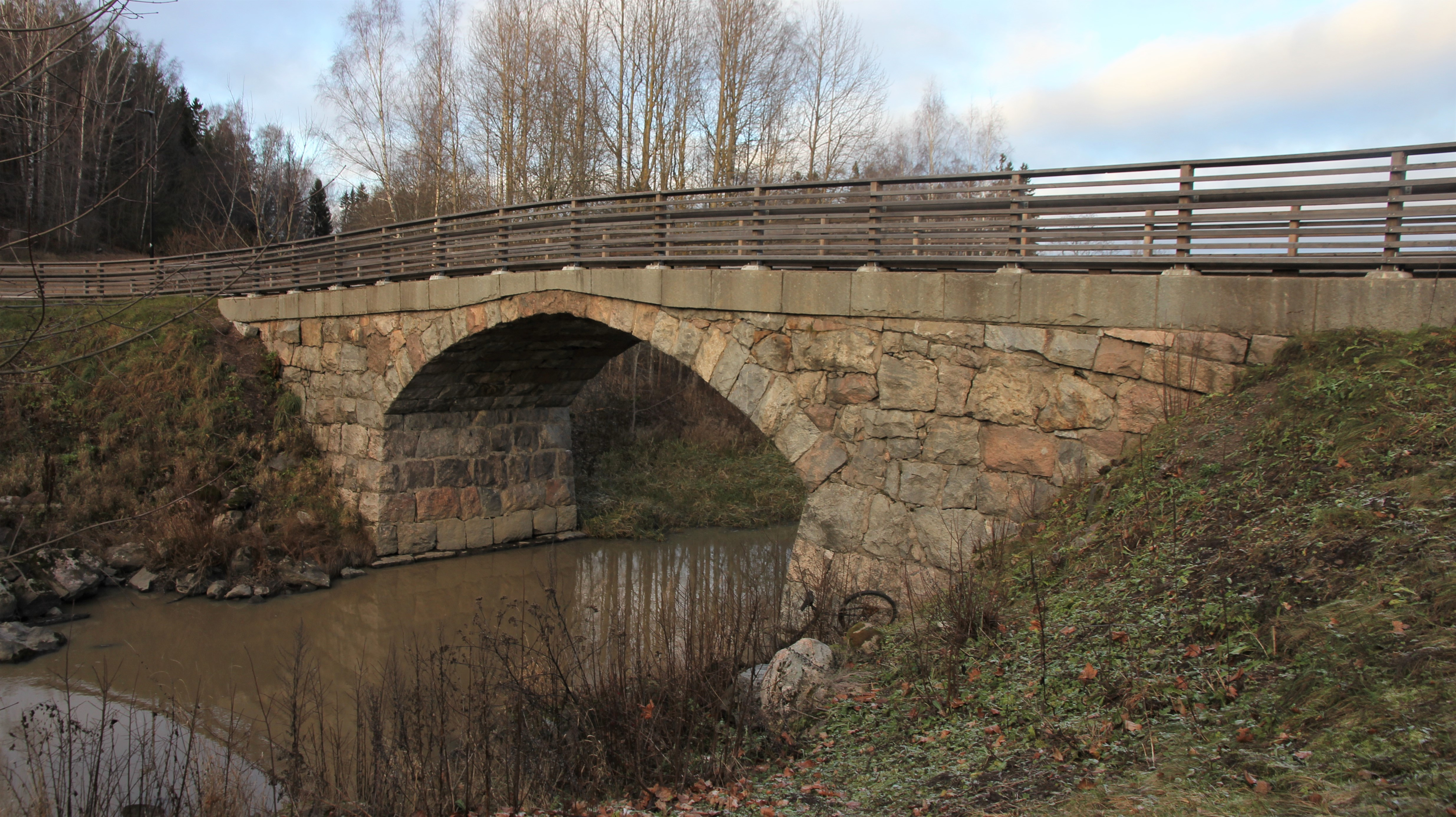 Hakkilan kivisiltaa Vantaalla. Insinööri Herman Norrménin suunnitelman (1896) mukaan vuonna 1898 rakennettu Hakkilan kivisilta ylittää Keravanjoen Vantaalla Tikkurilantie 19 lähistöllä, Vantaan Jokiniemen (joen vastaranta) ja Hakkilan (kuvan etuosa) kaupunginosissa. Hakkilan kivisilta osa Museoviraston valtakunnallisesti merkittäväksi luokittelemaan Kuninkaantien rakennettua kulttuuriympäristöä (RKY 2117). Kuvattu 22.11.2018. Koordinaatit kivisillan keskivaiheille.